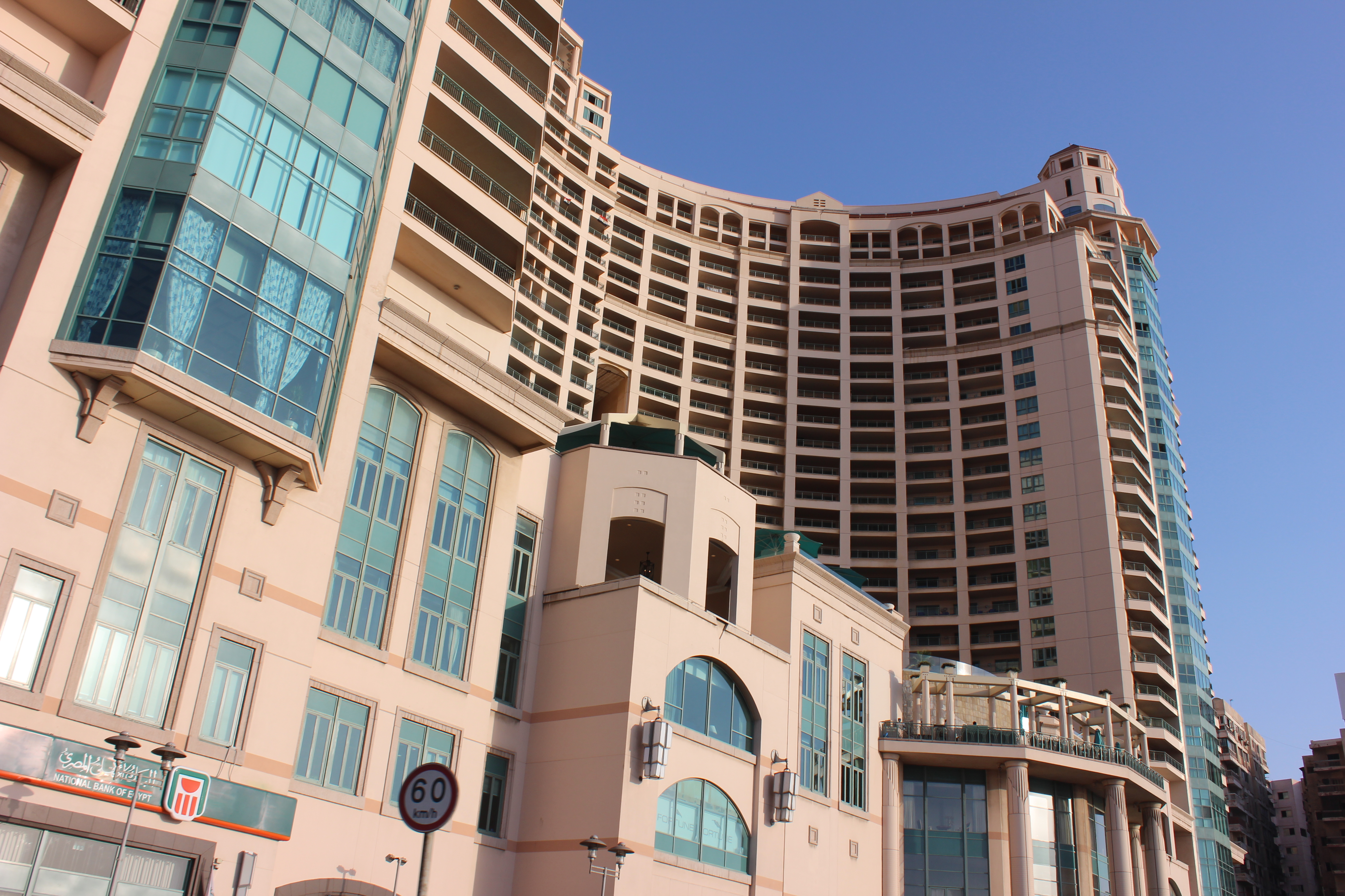 مباني الإسكندرية وبعض العلامات المميزة.